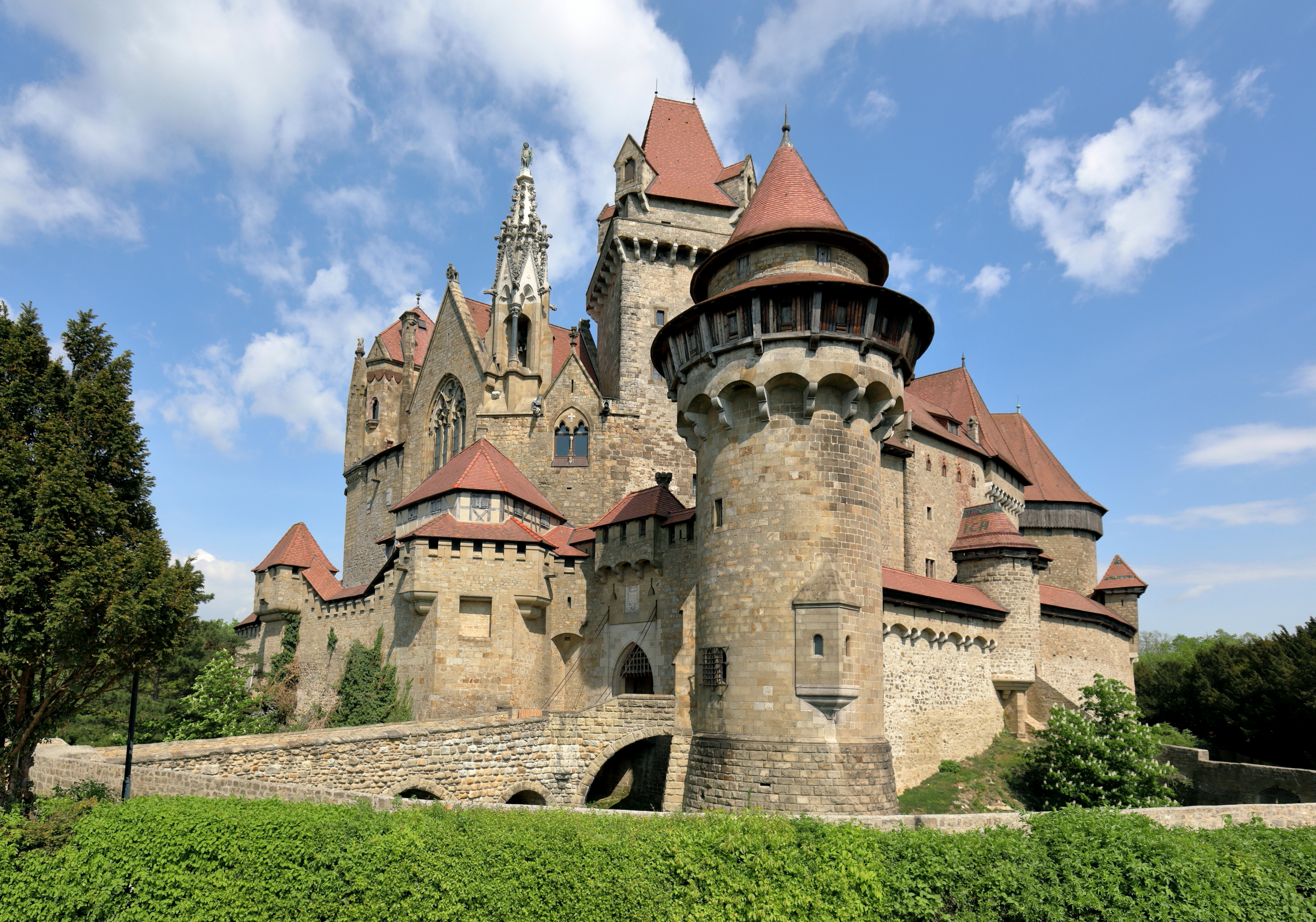 Südwestansicht der Burg Kreuzenstein in der niederösterreichischen Marktgemeinde Leobendorf. Die ursprüngliche Burg wurde im Zuge des 30-jährigen Krieges zerstört und anschließend als Baumaterial großteils abgetragen. Unter Graf Johann Nepomuk Wilczek erfolgte von 1874 bis 1906 ein Wiederaufbau der Burg als Museum für seine umfangreichen Kunstsammlungen. Die so entstandene Schauburg ist heute, ergänzt durch zahlreiche wiederverwendete mittelalterliche Bauteile und nach teilweiser Beseitigung der Brandschäden von 1915 und der Kriegsschäden von 1945, ein beliebtes Tourismusziel nördlich von Wien.